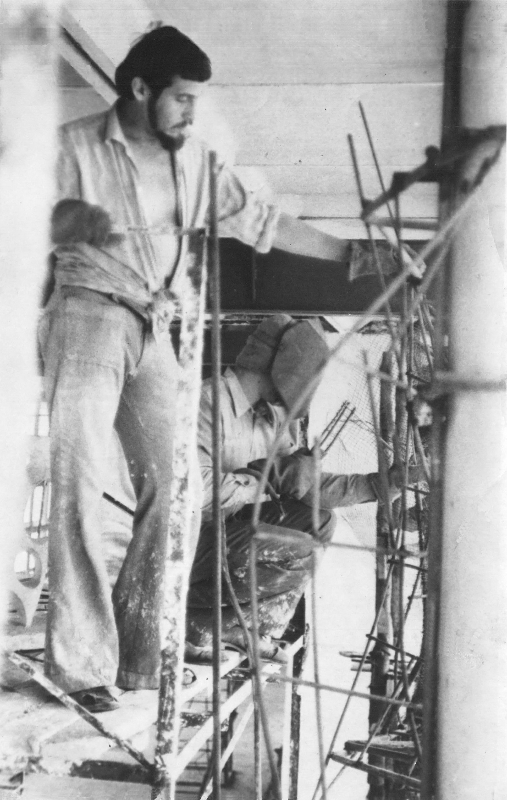 К. Козловский за работой в Доме природы